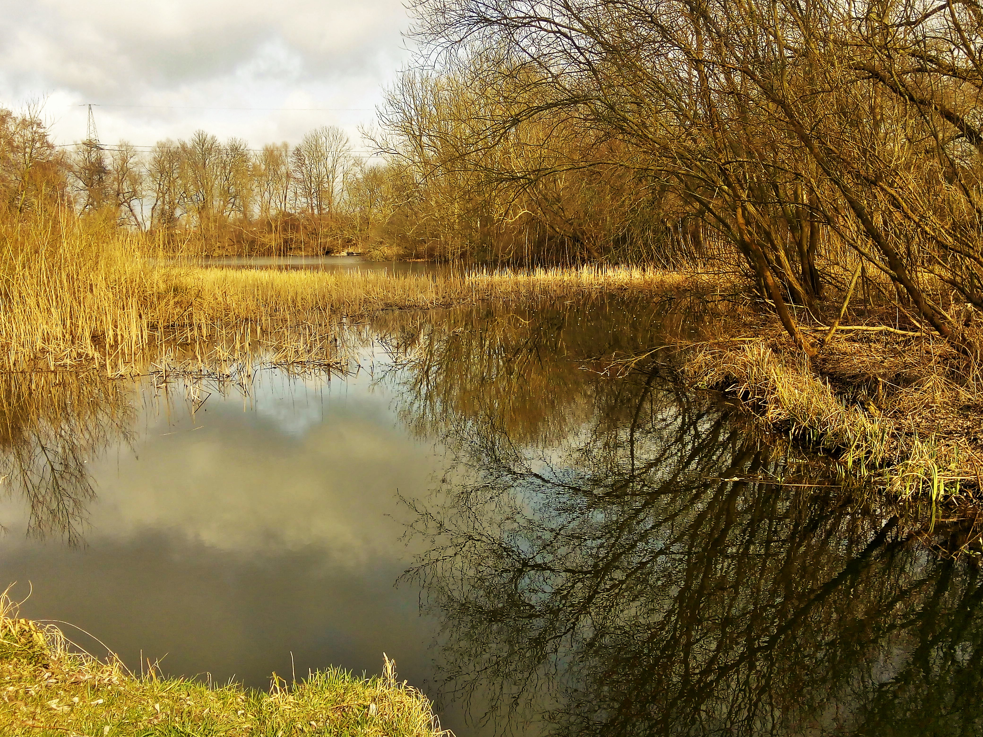 Blick auf den Bauernteich in Voigdehagen von der alten Kopfsteinpflasterstraße in Voigdehagen aus